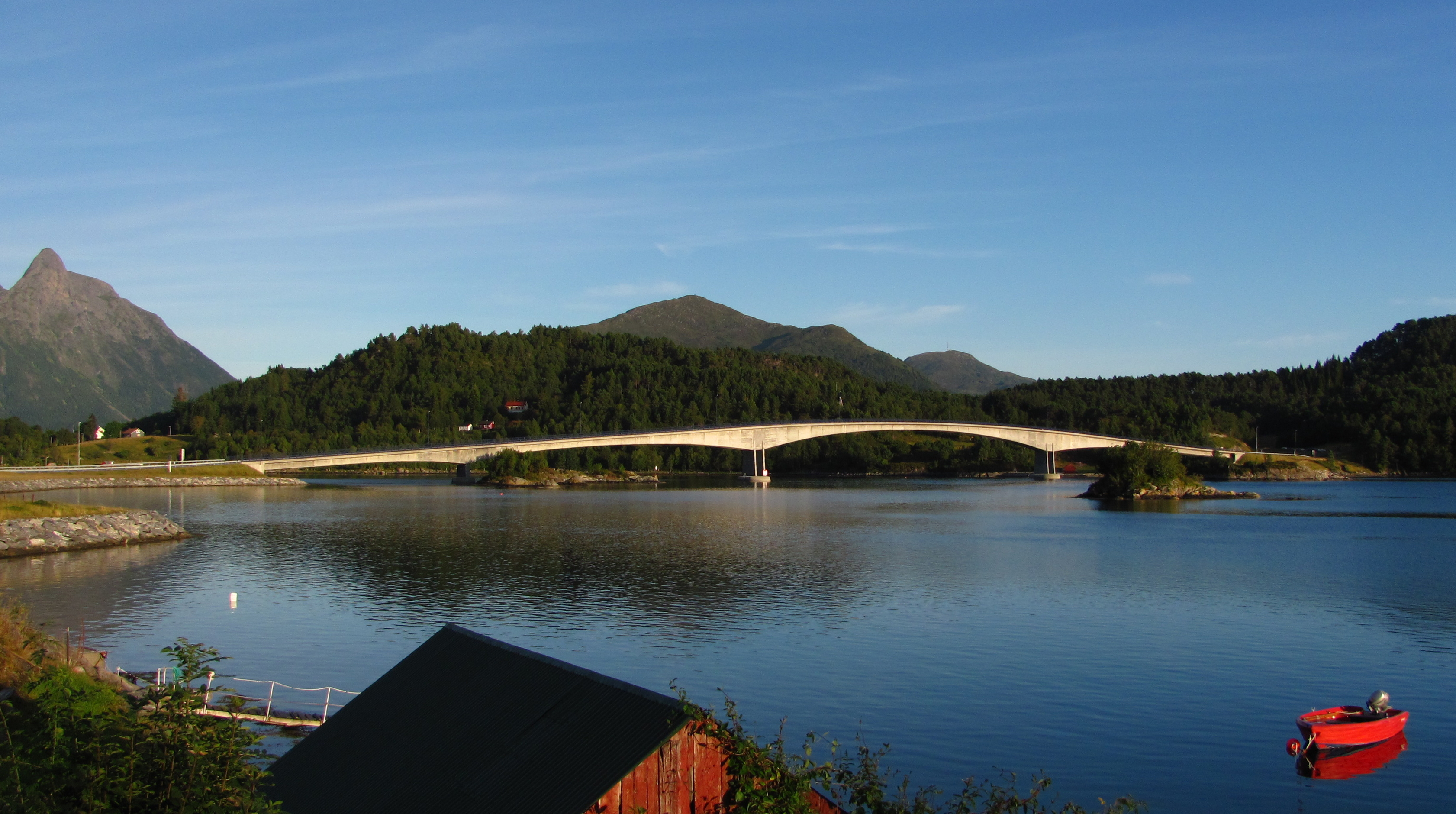 Eiksundbrua Eiksundbrua ligg i Ulstein kommune på Sunnmøre. Brua er ein del av Fylkesveg 653.